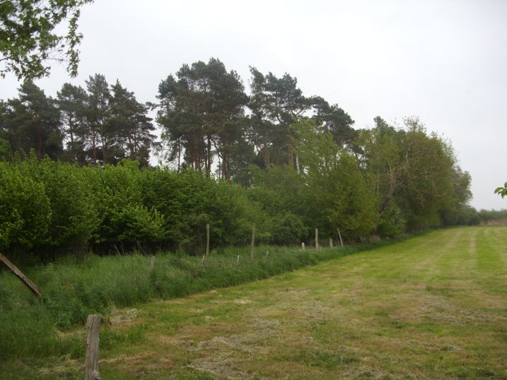 Naturschutzgebiet „Wendesser Moor“